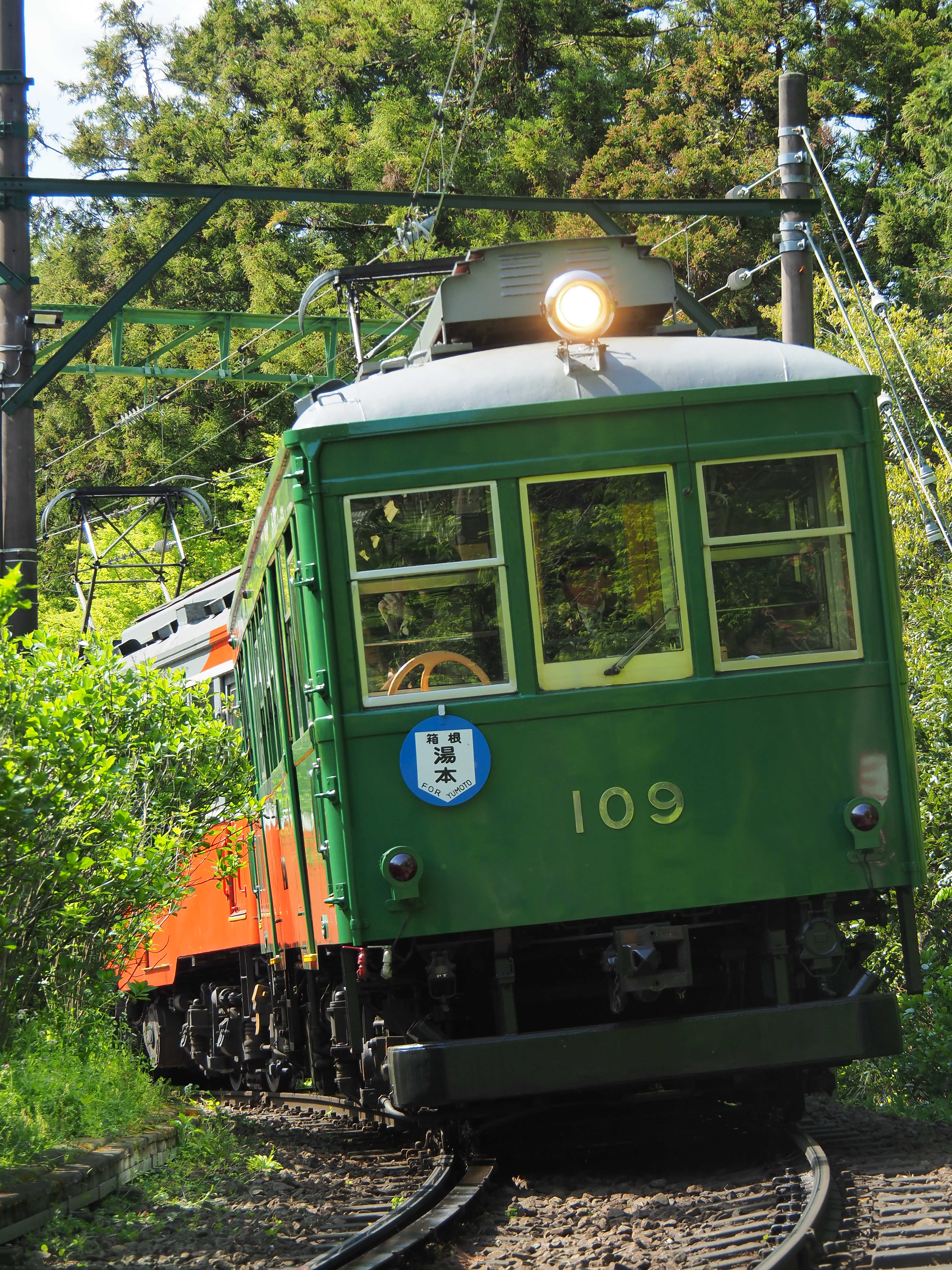 箱根登山鉄道の開業100周年を記念し、緑色になったモハ2形109号が大平台駅を発車。